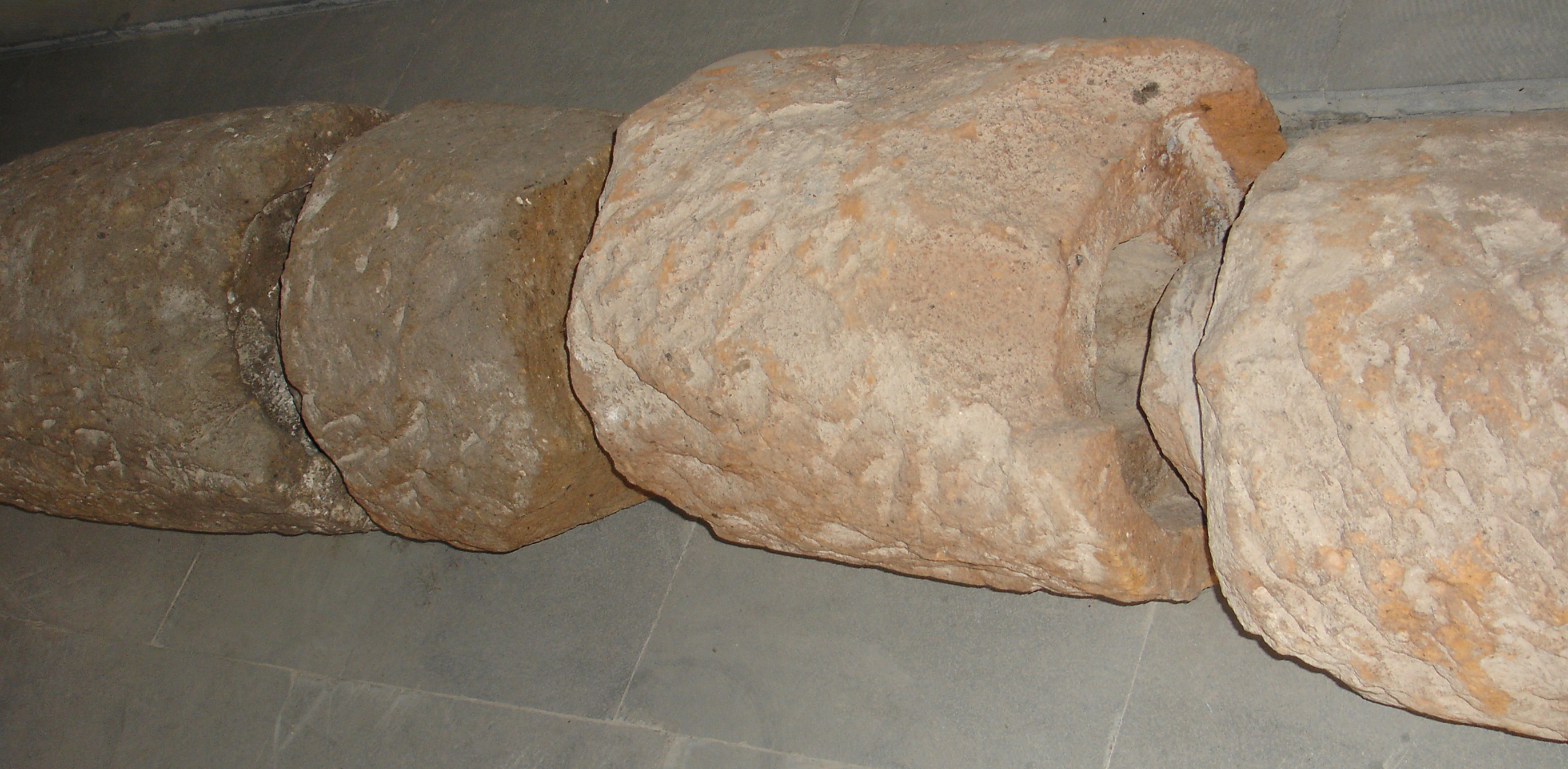 Own work based on image taken by gegman Erebuni museum, Yerevan, Armenia.